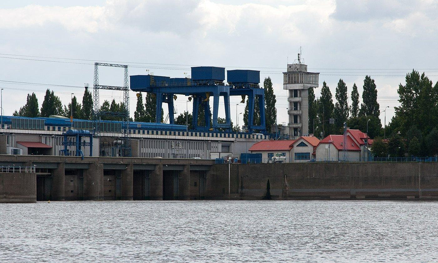 Elektrownia wodna we Włocławku